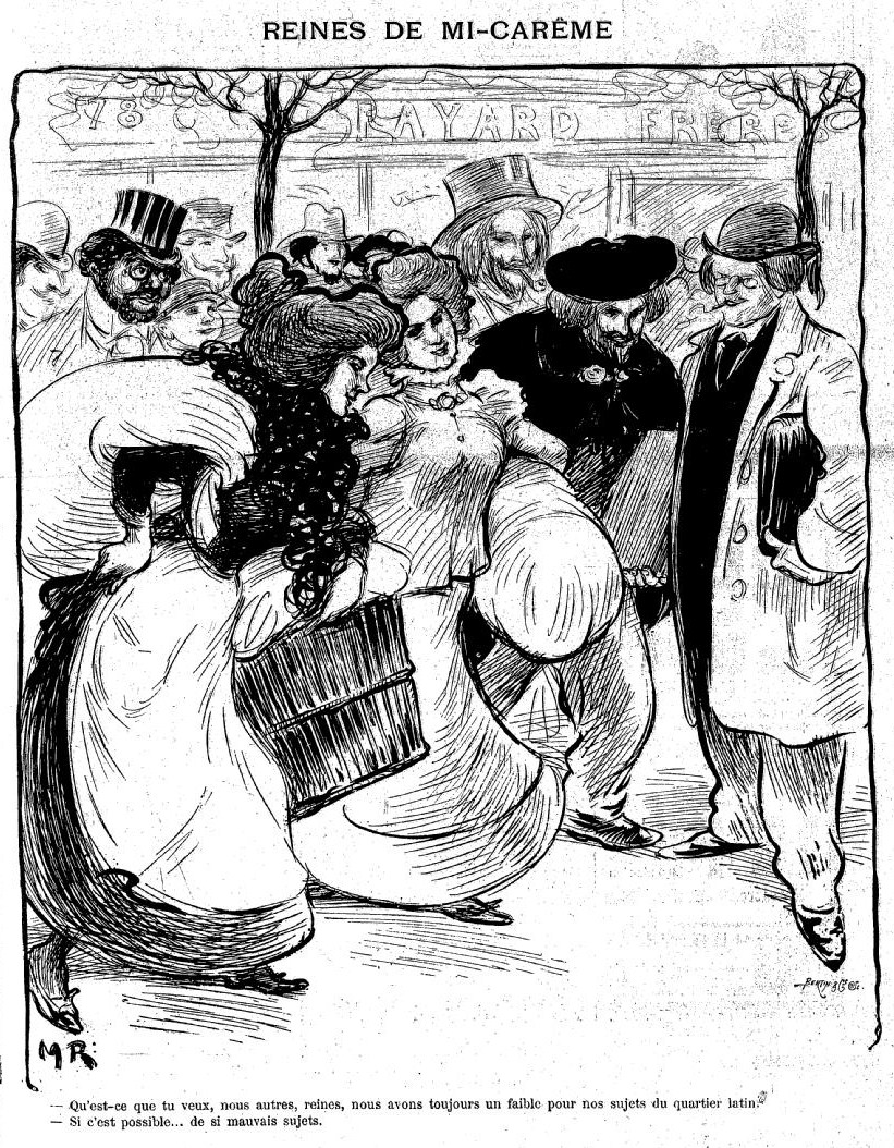 Dessin satyrique sur les reines de la Mi-Carême de Paris.